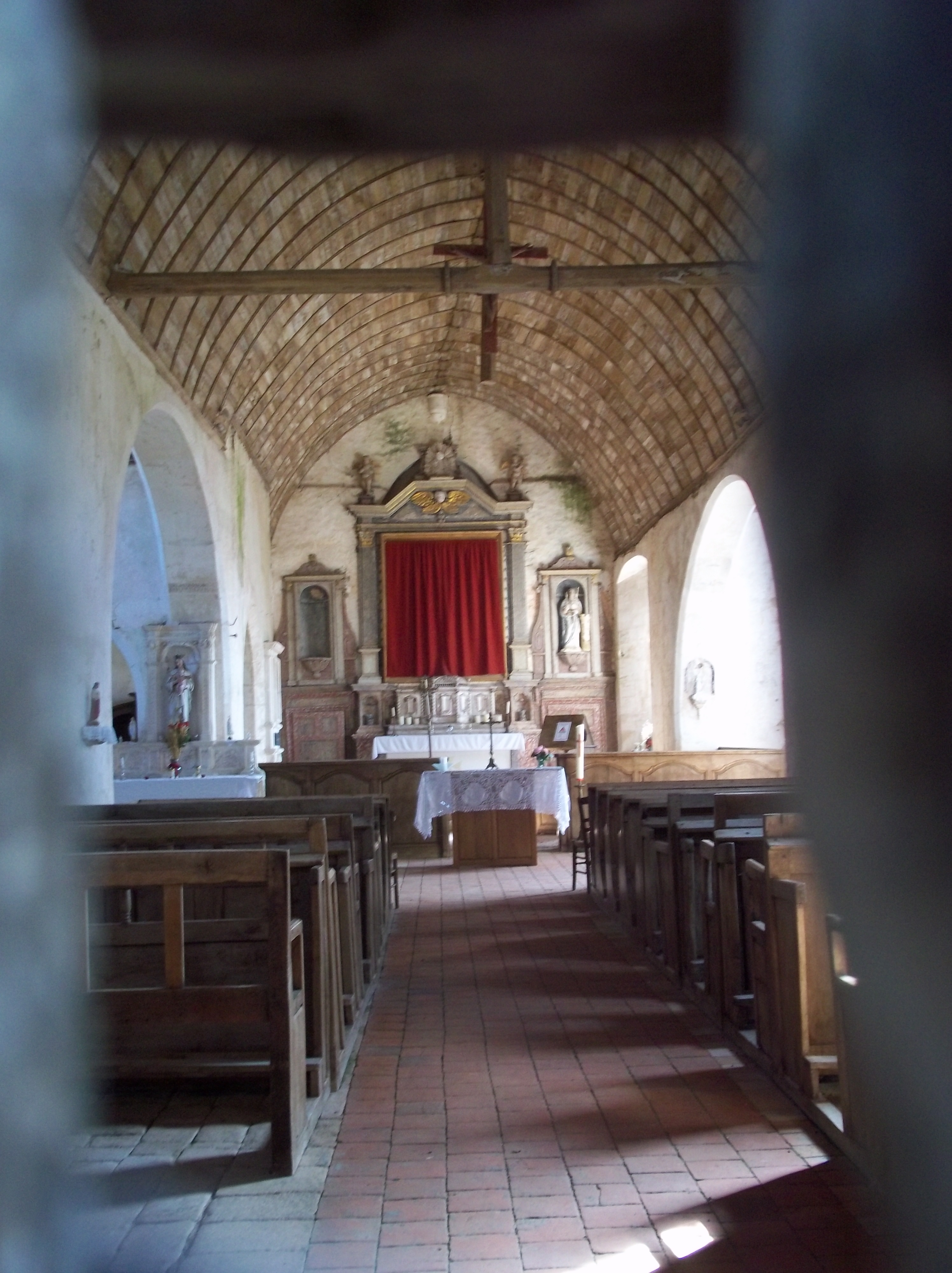 Eglise de la commune de Vezot (interieurs) - Sarthe - France